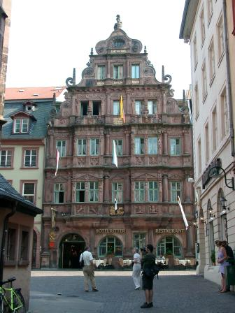 Foto des Hotels zum Ritter in Heidelberg. Aufgenommen am 15.06.2003. (C) Copyright 2003 Christian Bienia. Das Foto darf unter den Bedingungen der GNU Free Document License verwendet werden